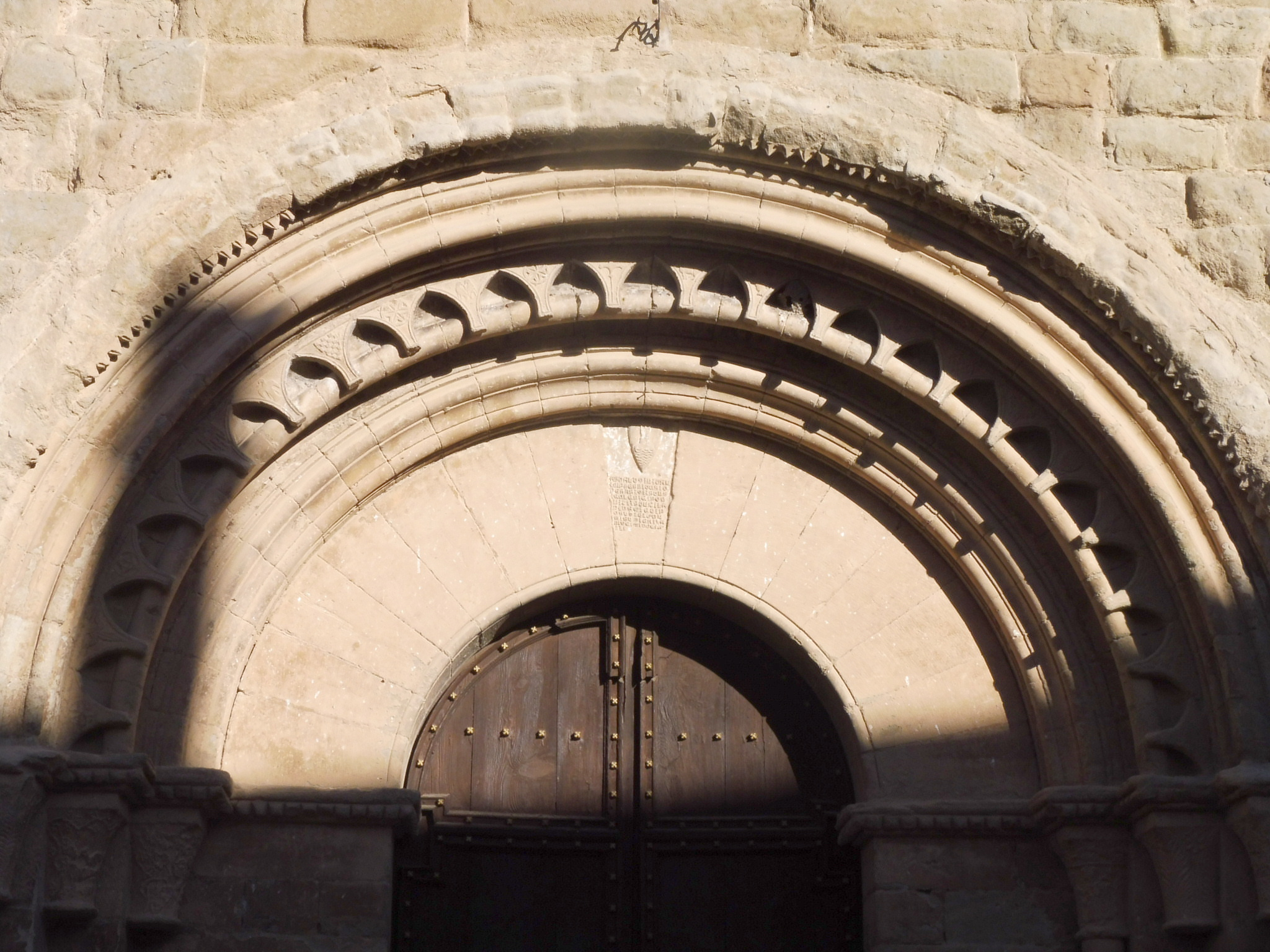 Església de Sant Miquel de Castelló de Farfanya: arquivoltes del portal